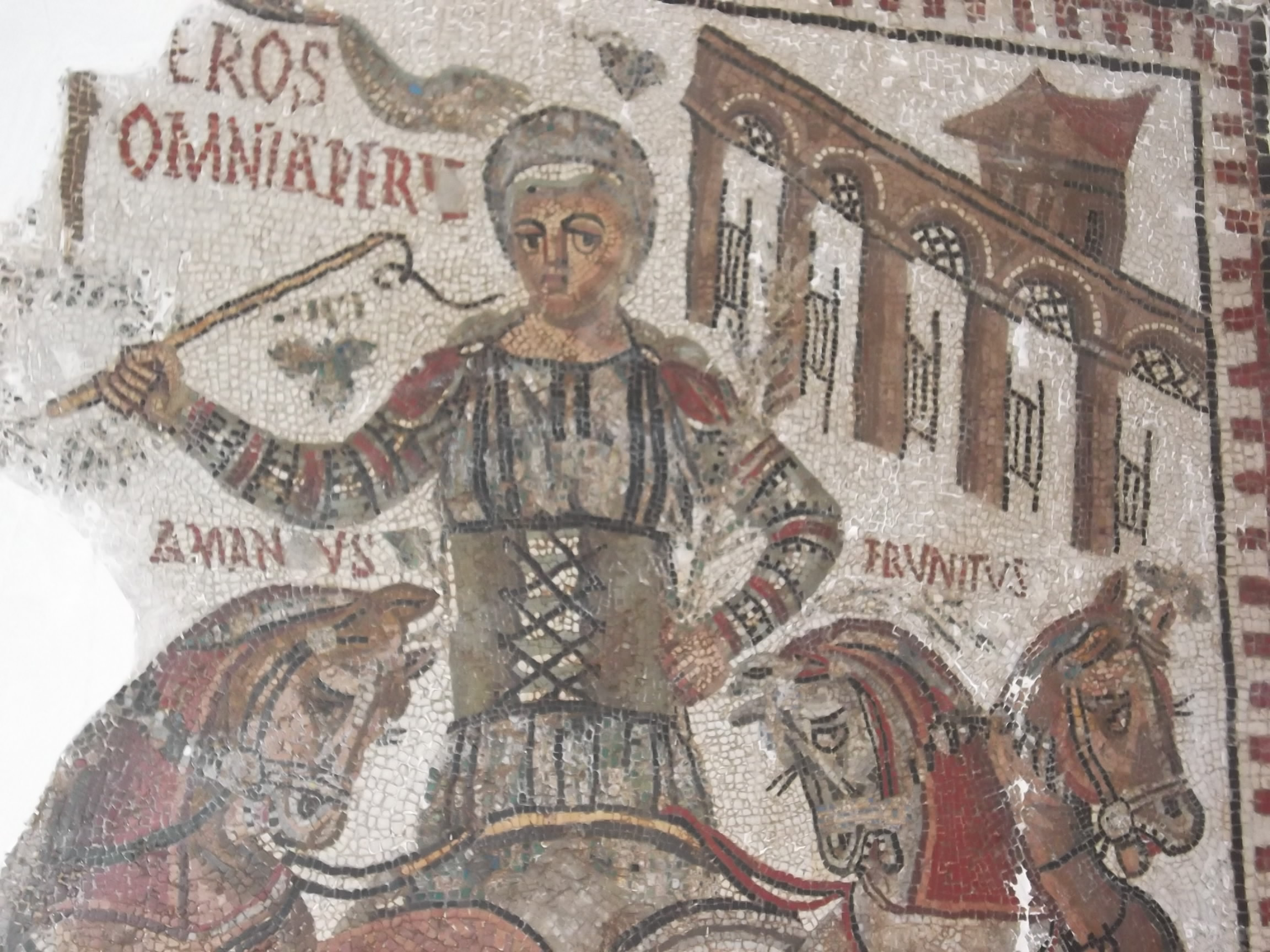 Mosaïque romaine exposée au musée national du Bardo (Tunisie)